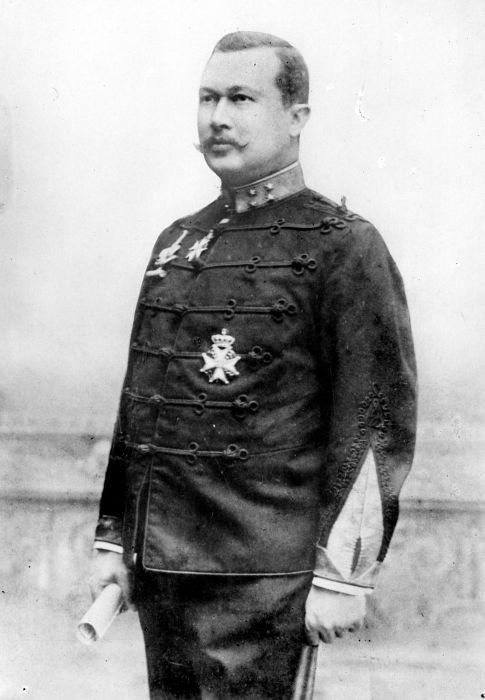 Negatief. Portret van Luitenant-Generaal G.C.E. van Daalen